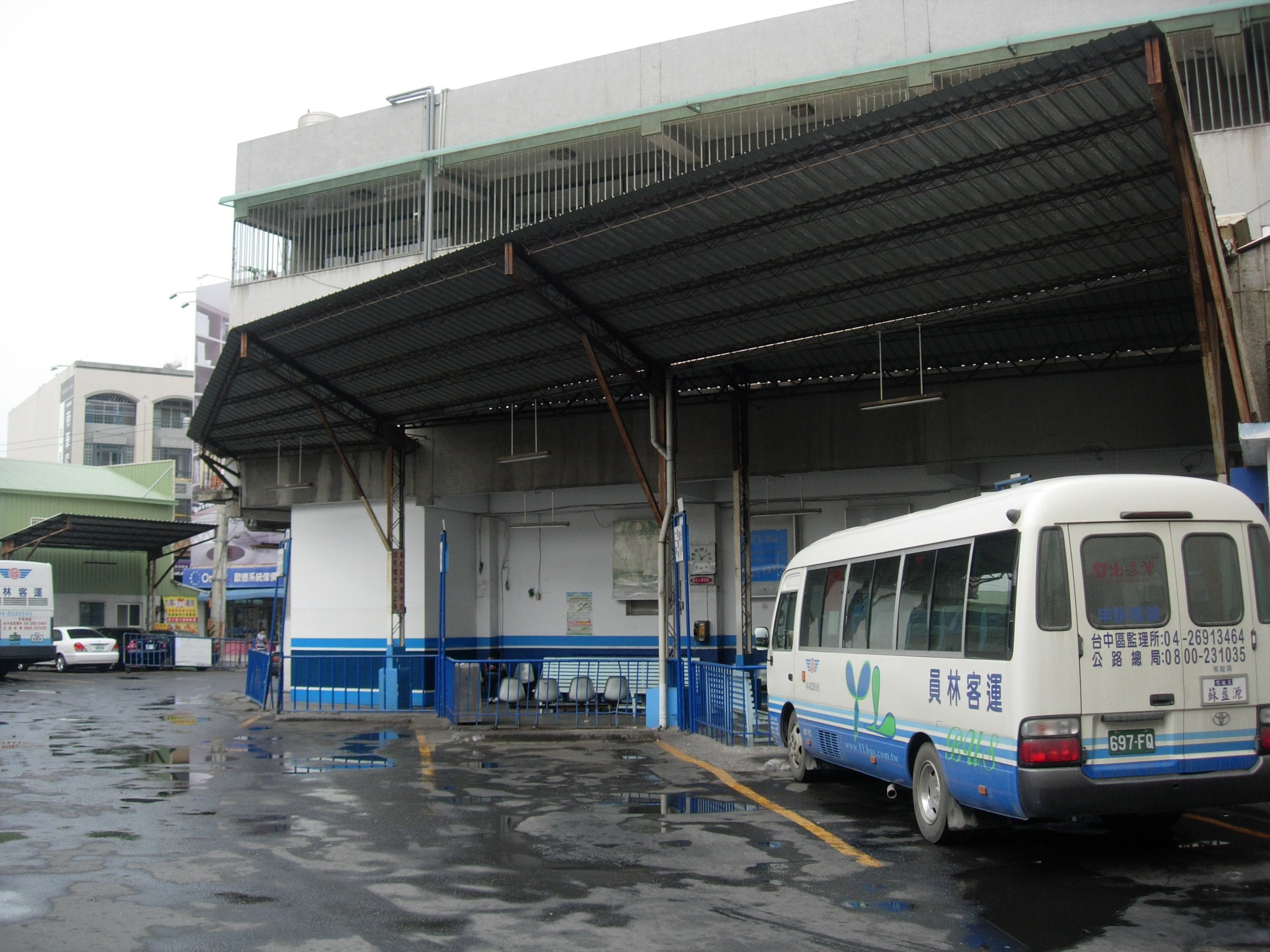 中文（台灣）: 員林客運員林站月台全景